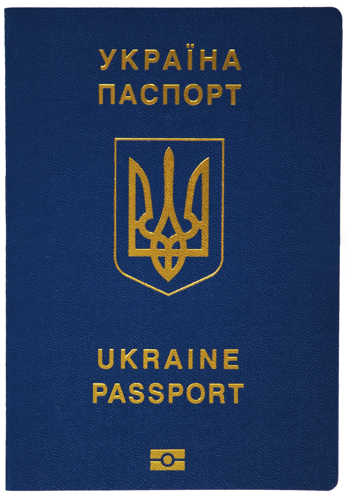 Зовніншній вигляд паспорта громадянина України для виїзду за кордон